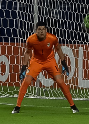 (São Paulo - SP, 14/06/2019) Jogo de Abertura da Copa América Brasil 2019. Foto: Marcos Corrêa/PR